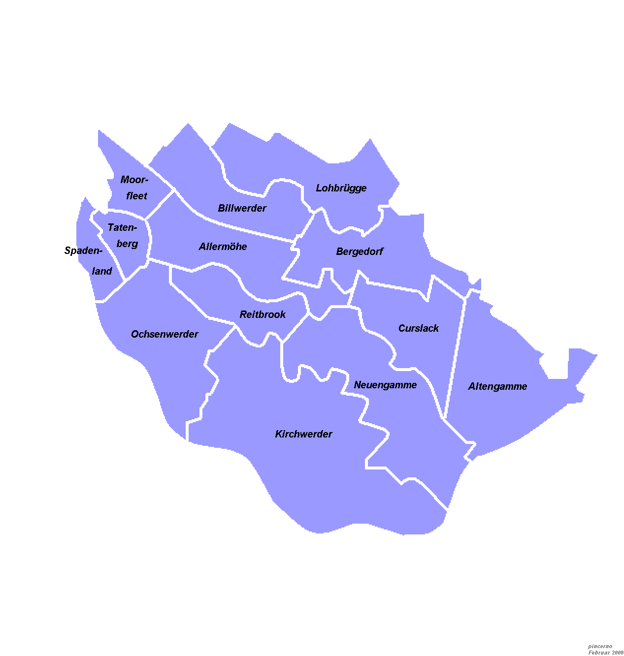 Stadtteile im Bezirk Bergedorf in Hamburg.